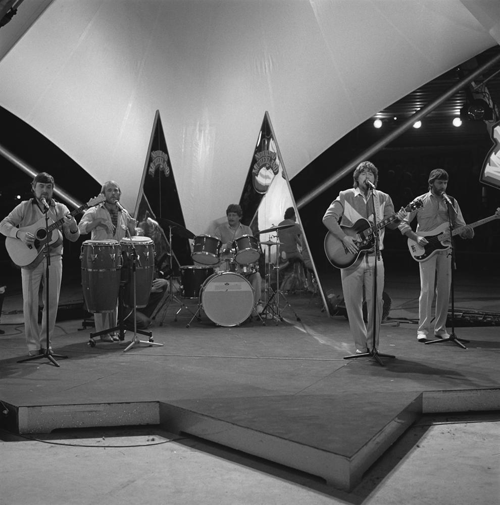 The Cats, 'Nederland Muziekland'